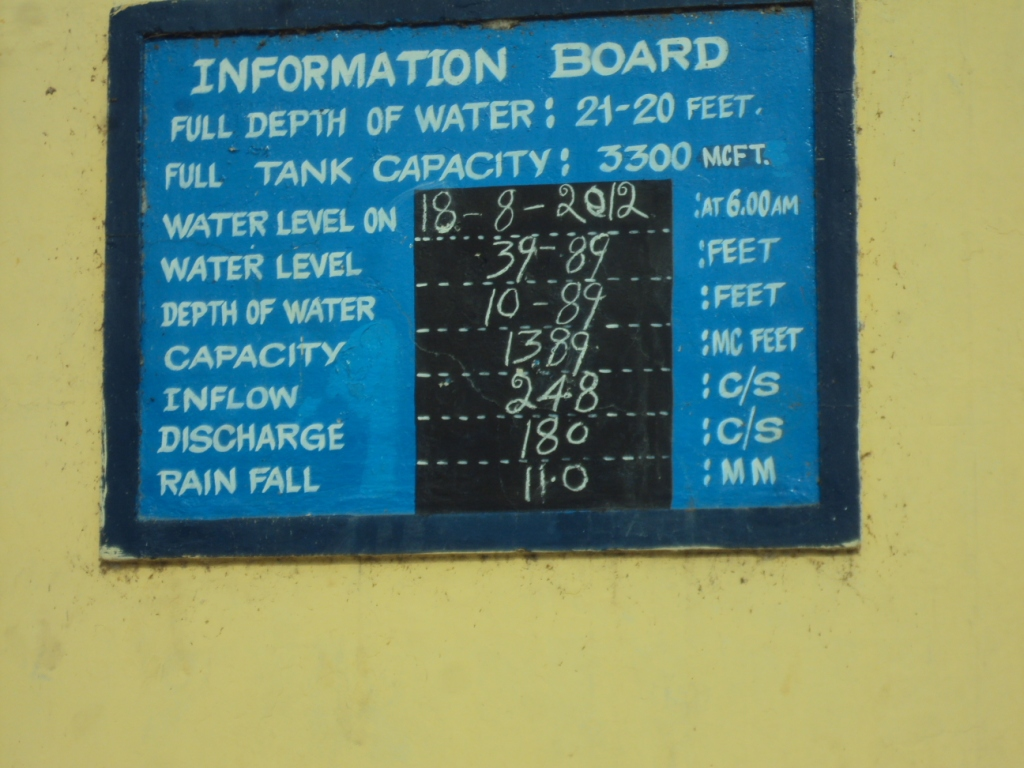 புழல் நீர்த்தேக்கத்தின் கொள்ளளவு, இருப்பு தகவல்கள் - ஆகத்து 2012